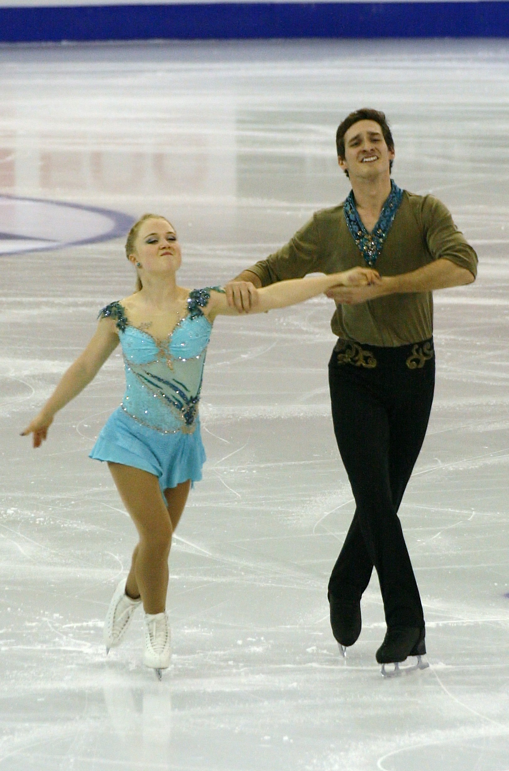 Джулианна Сеген и Чарли илодо (Канада) на финале Гран-при по фигурному катанию 2015-2016.